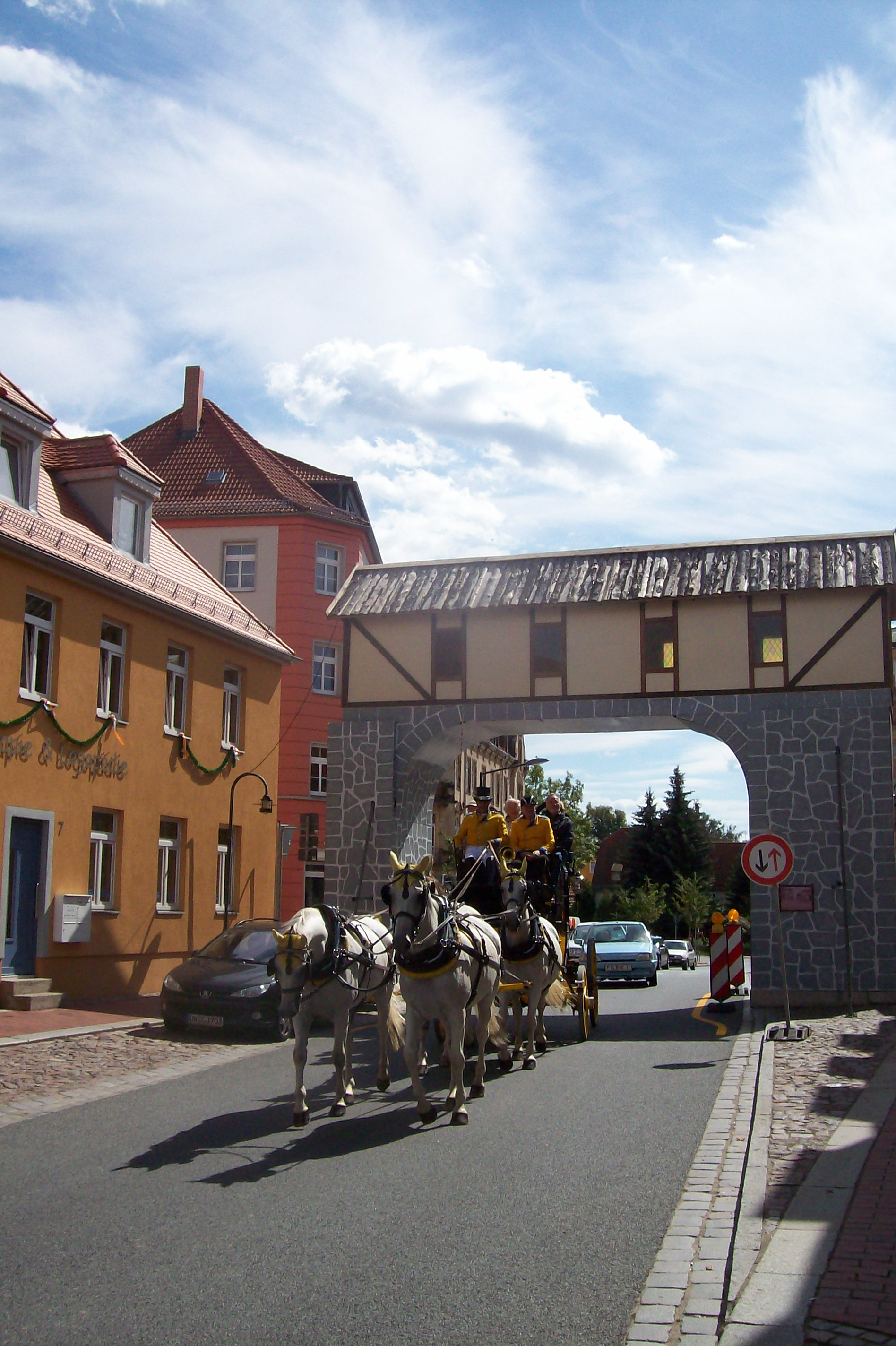 Postkutsche passiert das Freiberger Tor in Wilsdruff